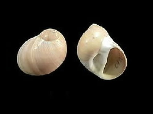 Polinices hepaticus del Archipiélago Los Roques, Dependencias Federales - Venezuela.